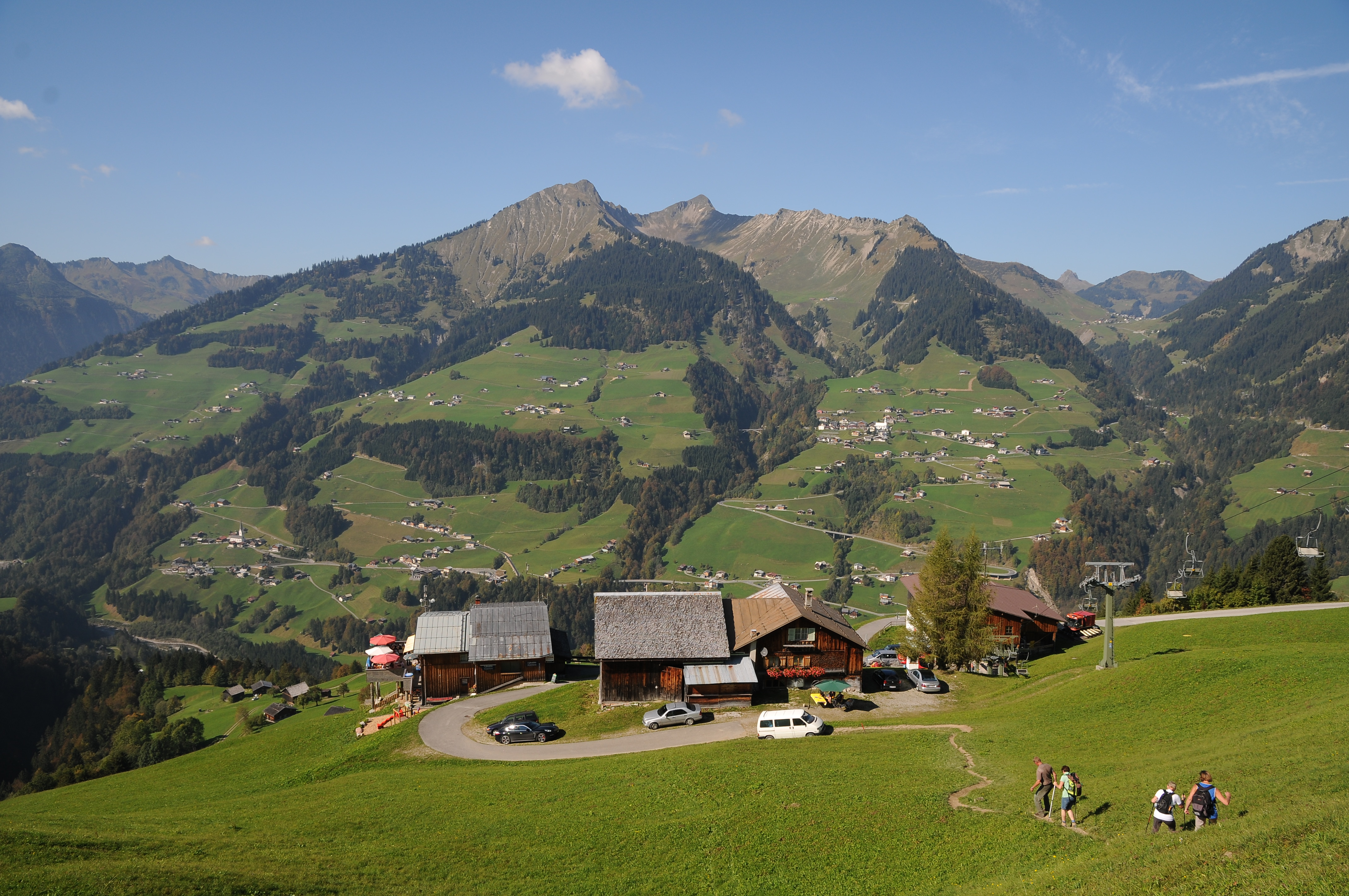 Wanderung von Sonntag, Stein nach Alpe Oberpartnom. (Partum). Blick von der Bergstation der Seilbahn auf Fontanella, Faschina und die Damülser Mittagsspitze.